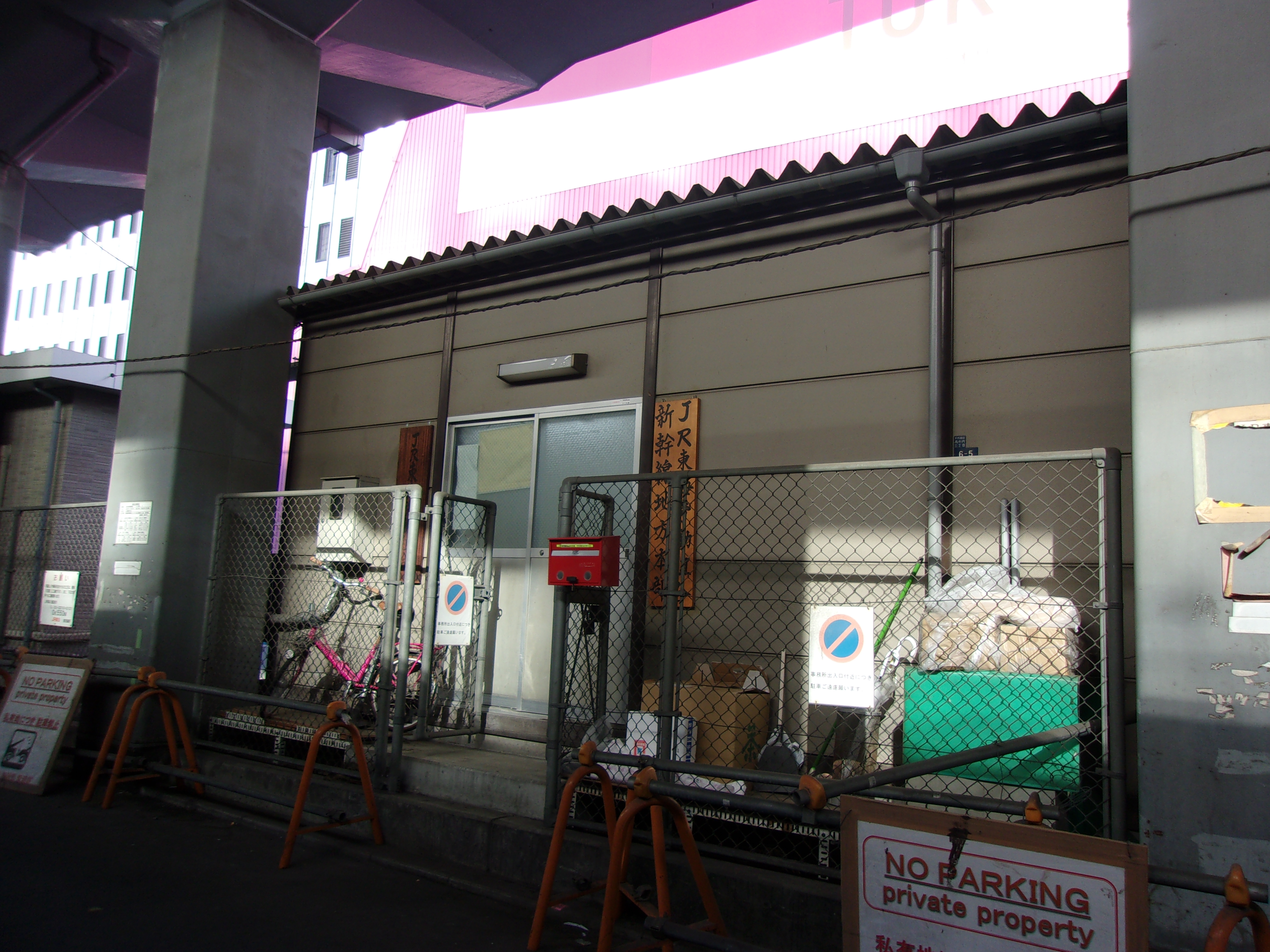 東海道新幹線第四有楽高架橋下のJR東海労働組合新幹線地方本部事務所